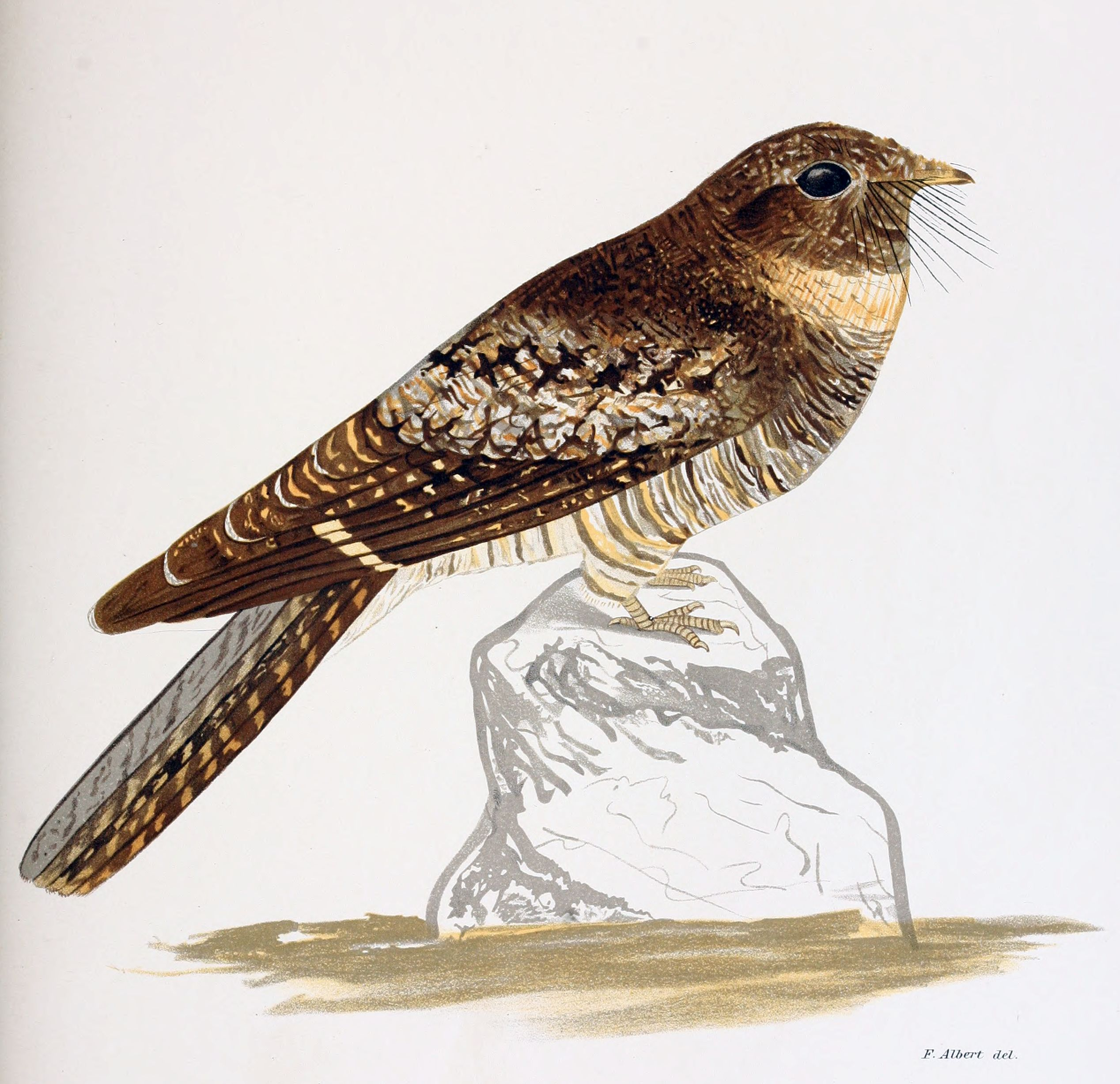 Caprimulgus (Stenopsis) andinus Ph.